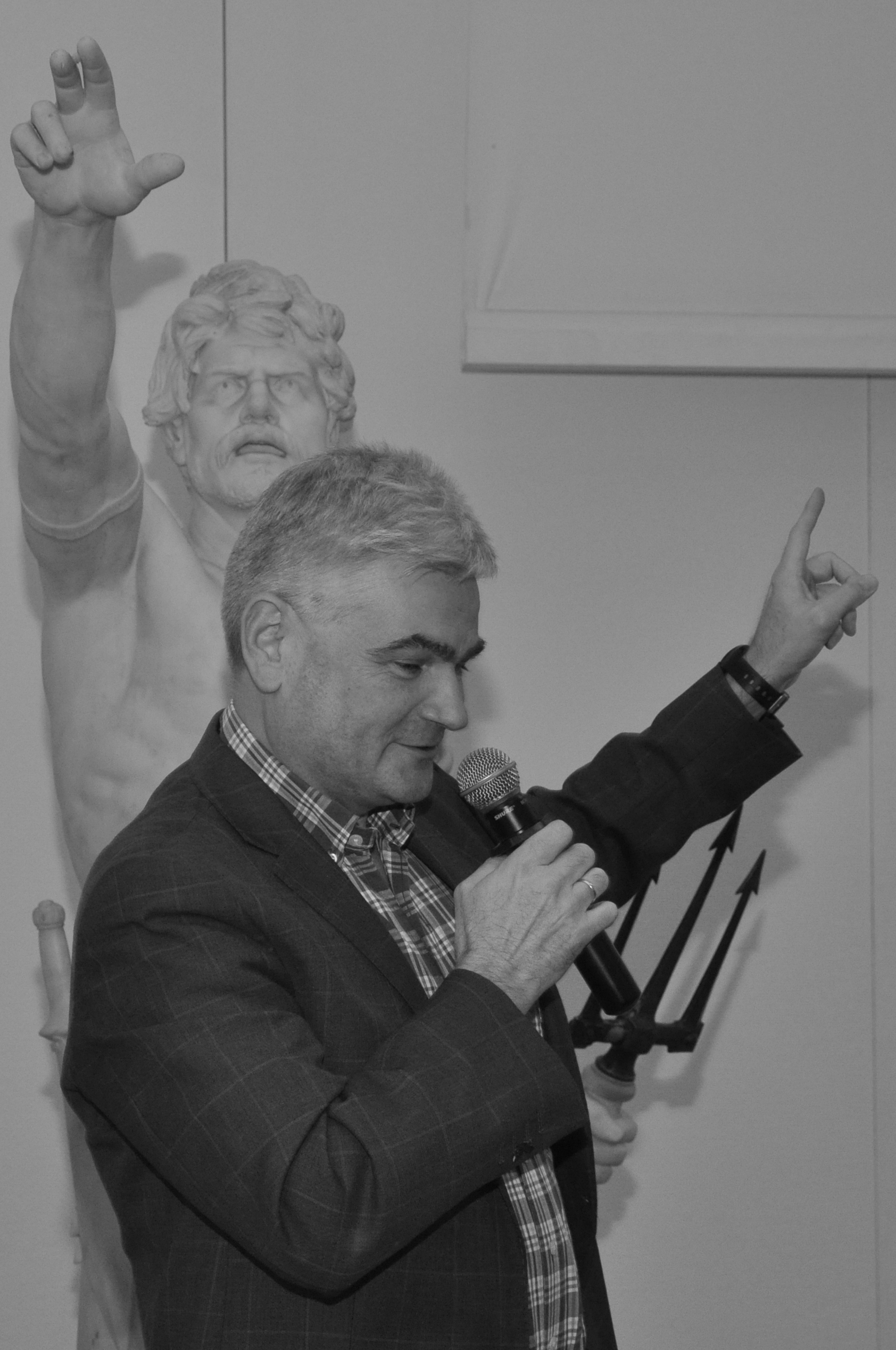 15 urodziny Wikipedii Zachęta Narodowa Galeria Sztuki / Zachęta National Gallery of Art